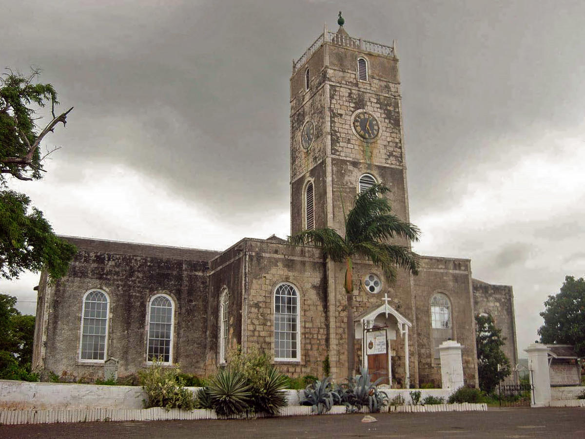 St. Peter Church in Falmouth, Jamaica from 1795.